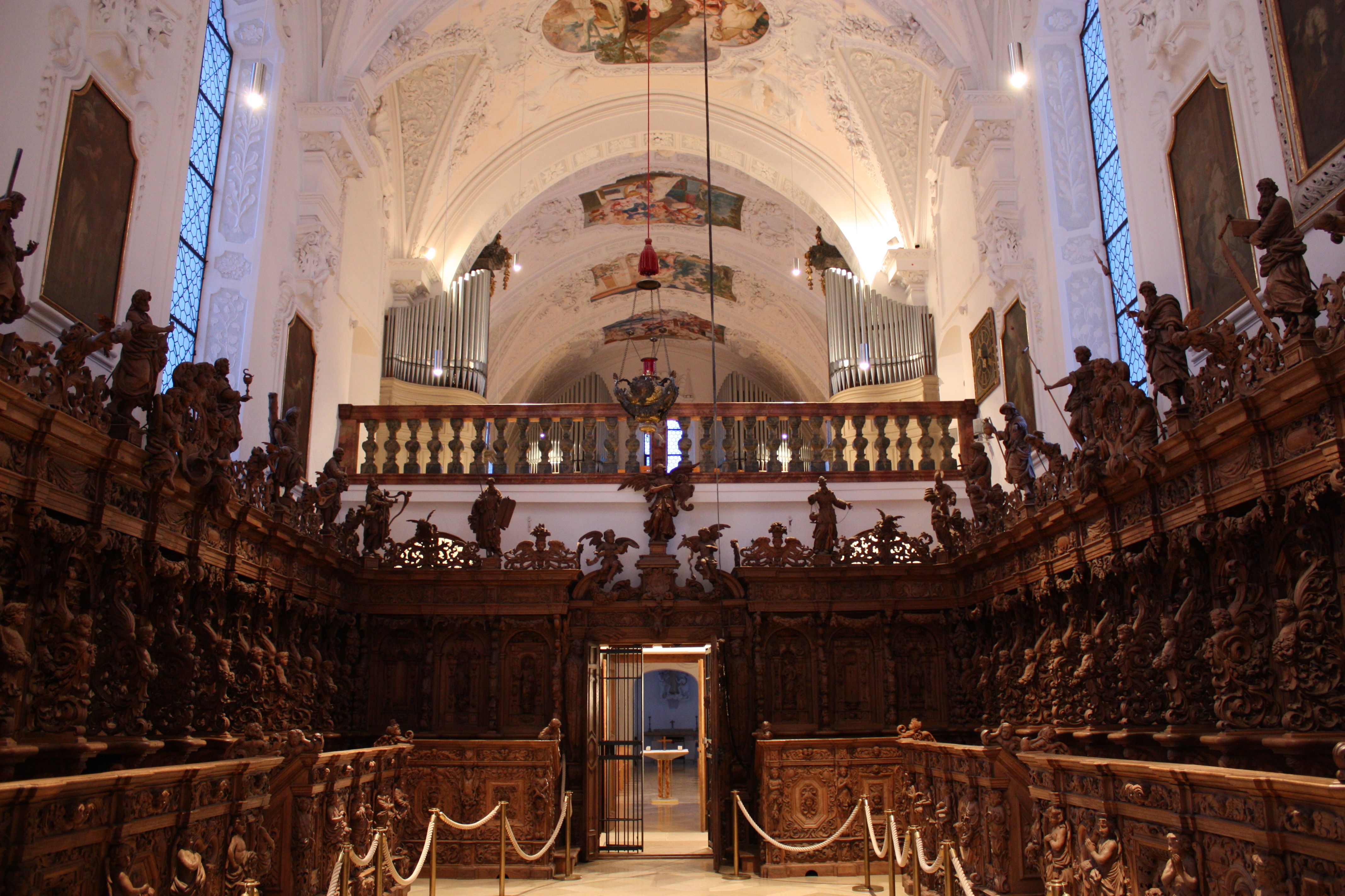 Gemälde in der ehemaligen Klosterkirche der Kartause in Buxheim bei Memmingen - OpenStreetMap (Info)